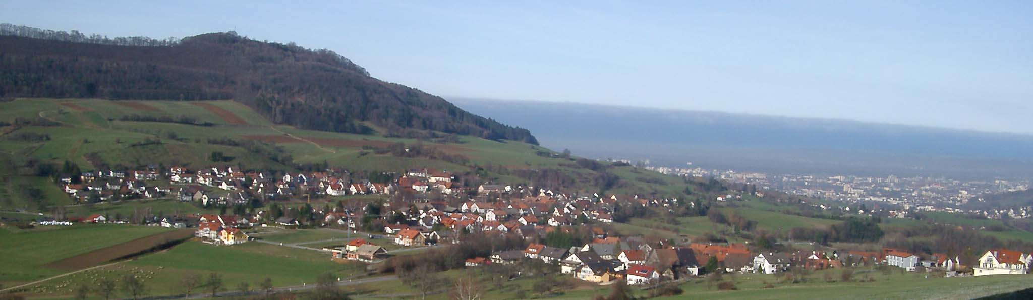 Wittnau am Schönberg, GNU-FDL, selbst fotografiert